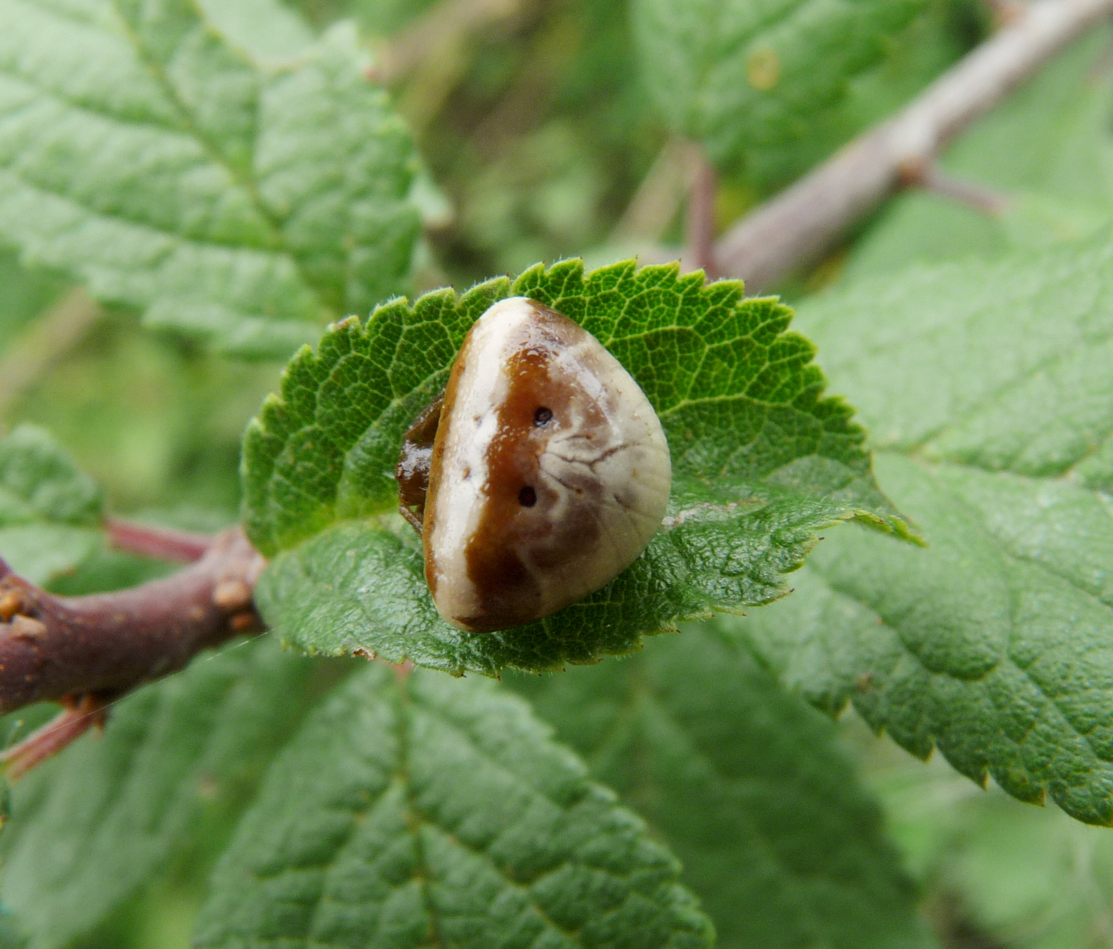 Cyrtarachne ixoides, bei Livorno, Toskana